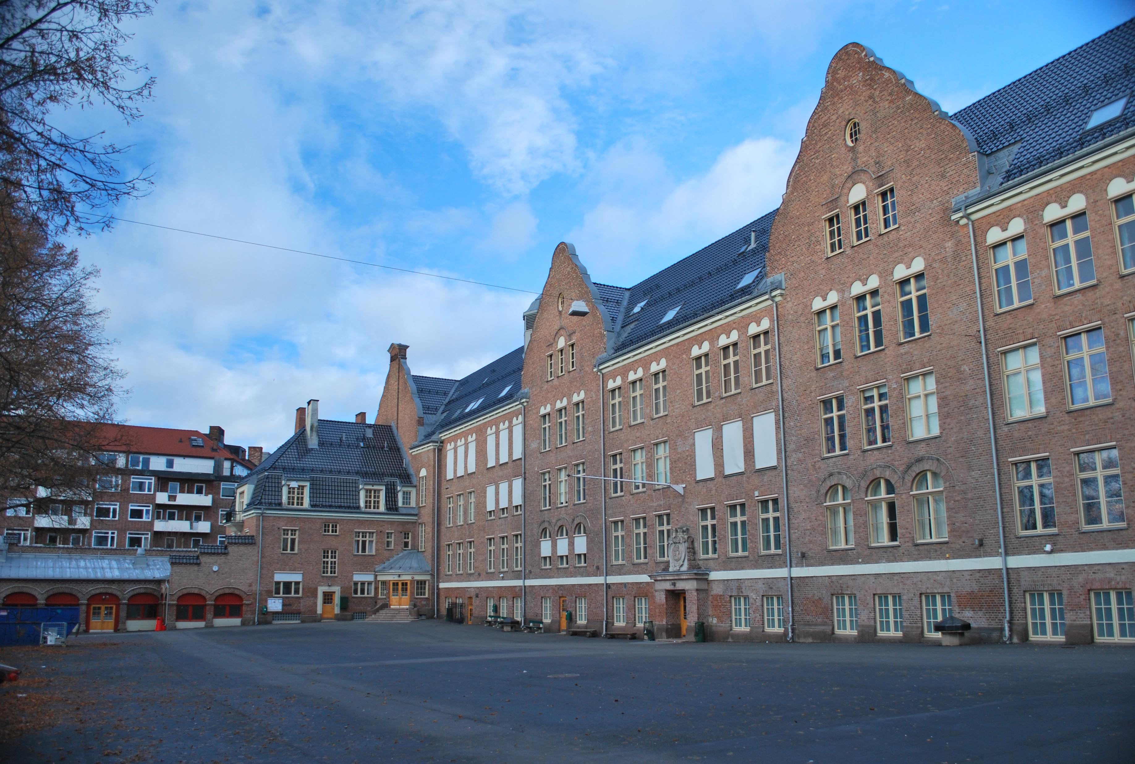 Fagerborg videregående skole med skoleplassen